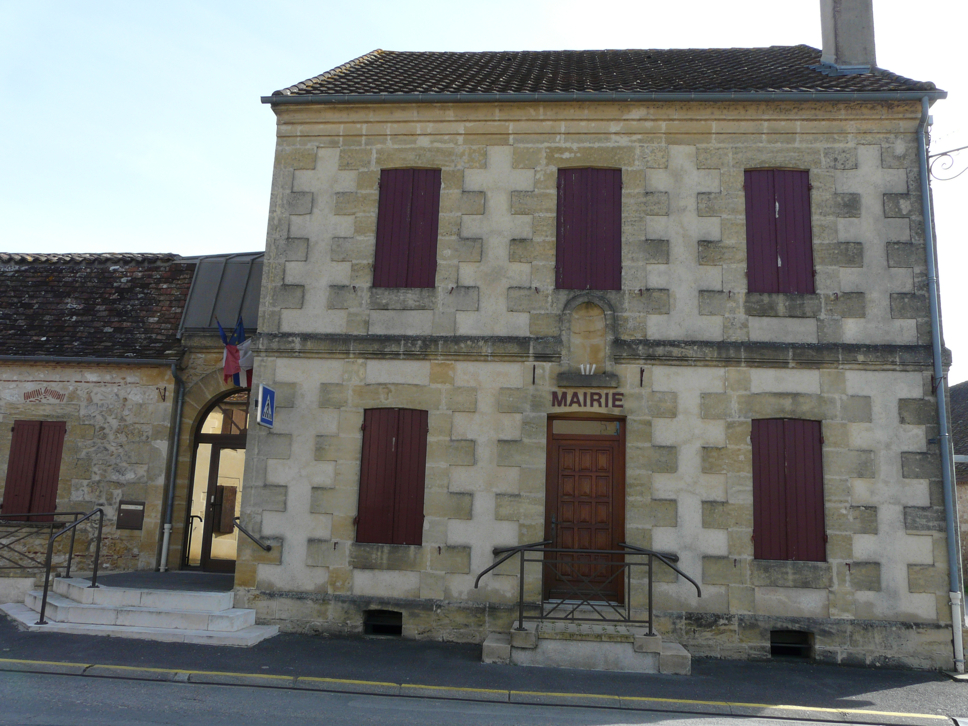 La mairie de Saint-Germain-et-Mons, Dordogne, France.